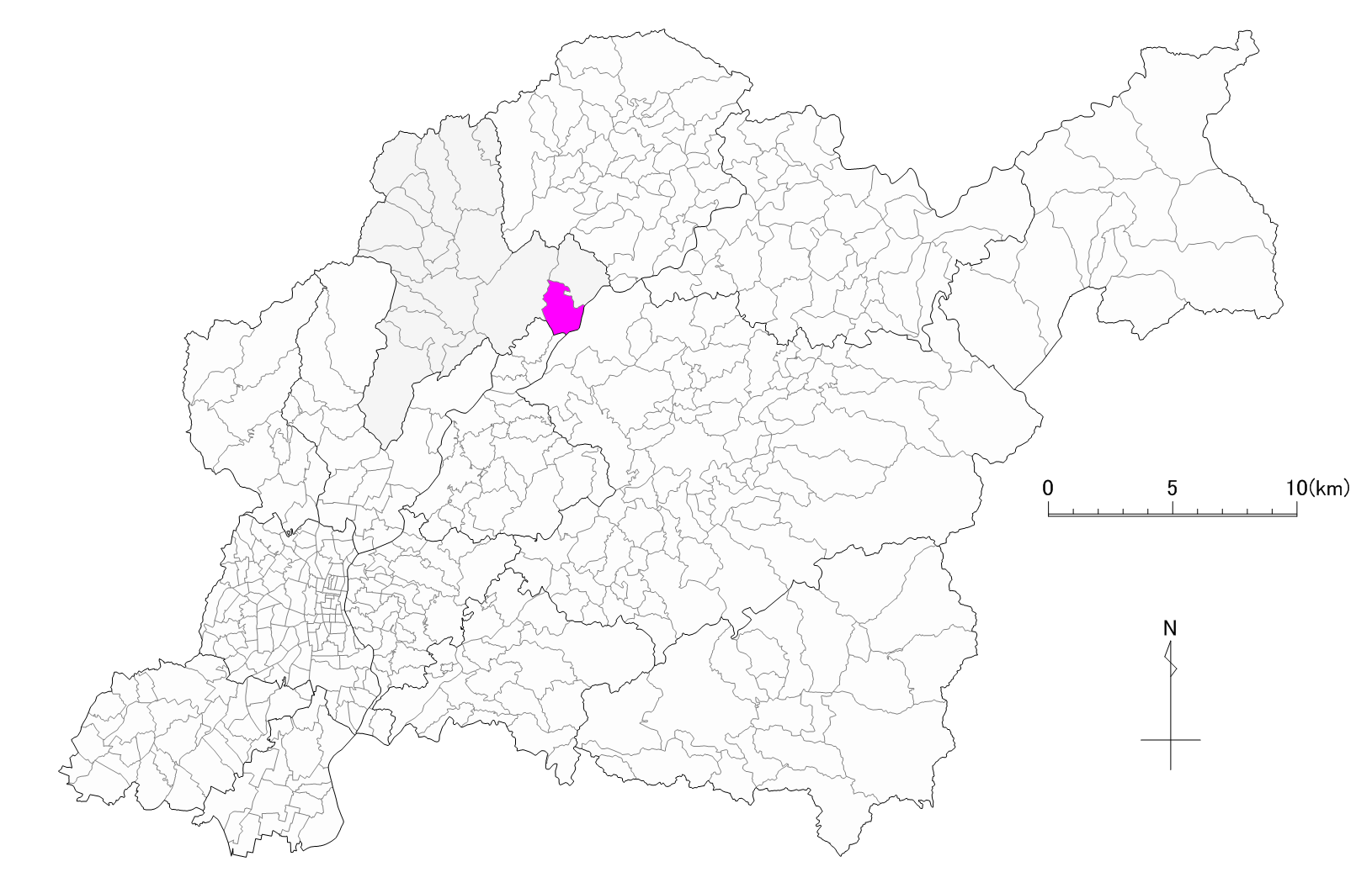 豊田市下川口町位置図